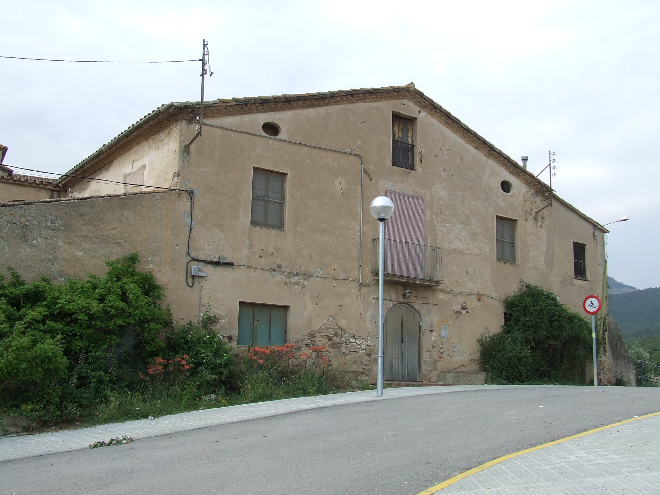 Ca l'Atzet (La Parròquia de Bigues, Bigues i Riells, Vallès Oriental)